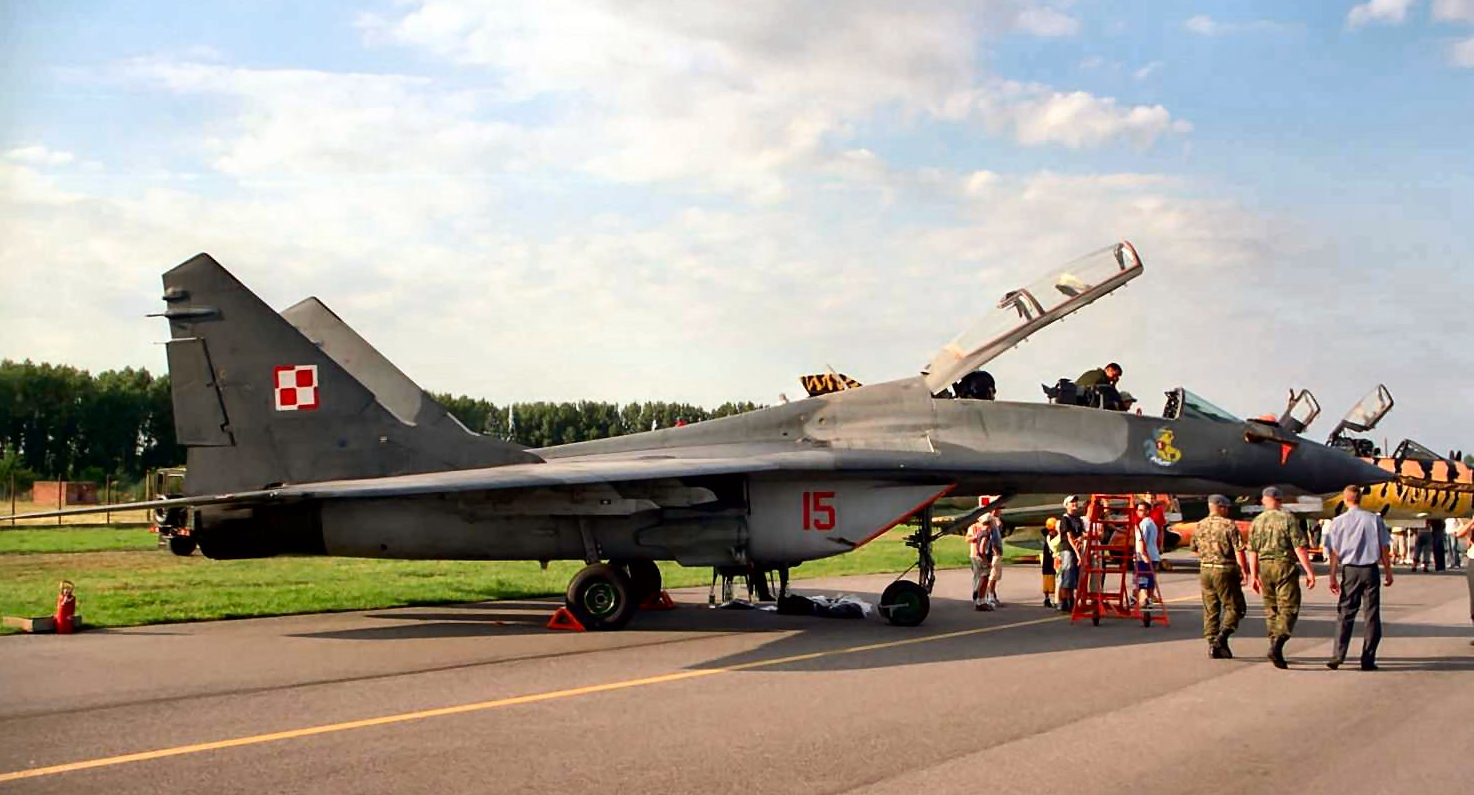 Samolot Mig-29. Wystawa statyczna Radom Air Show 2005